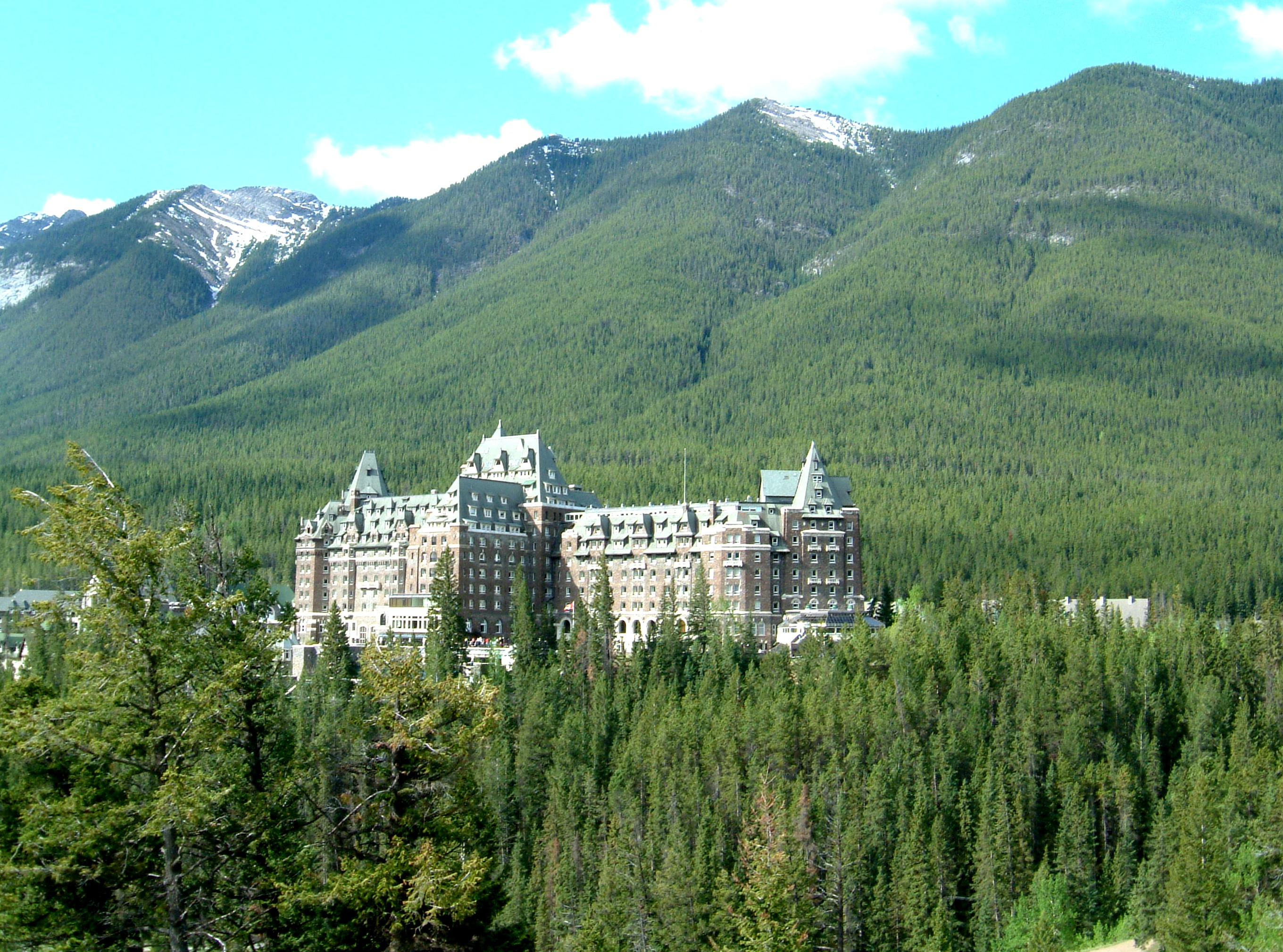 Kanada Fairmont_Banff_Springs_Hotel